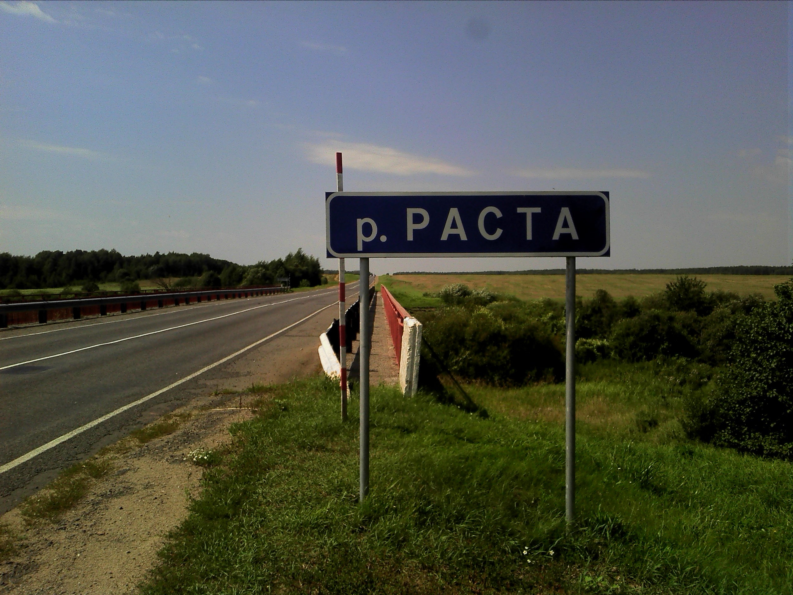 Мост через реку Раста